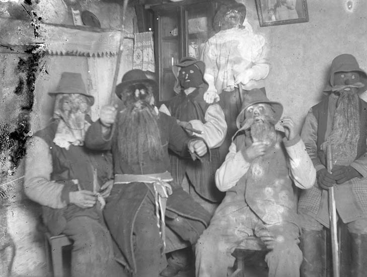 Enligt notering: "Julknutar 1922" På tjugondedag Knut klädde man ut sig (så mycket maskerad som det var möjligt) och sedan gick man runt i byn och knackade dörr. Detta var sed på vissa orter. Bohusläns museum UMFA53464:0600